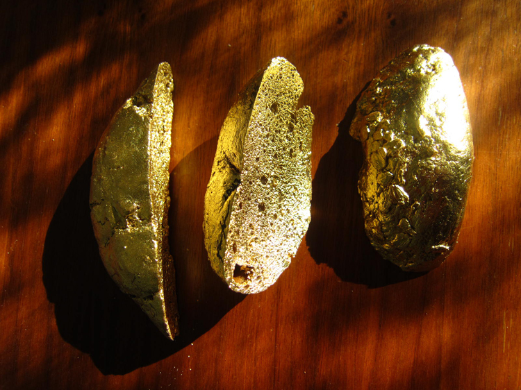 Gold Anlage als Anlagegoldbarren in Form von vergoldeten Brotenden mit historischem DEGUSSA Zertifikat. Ein Social Gold Kunstprojekt von Johannes Angerbauer-Goldhoff